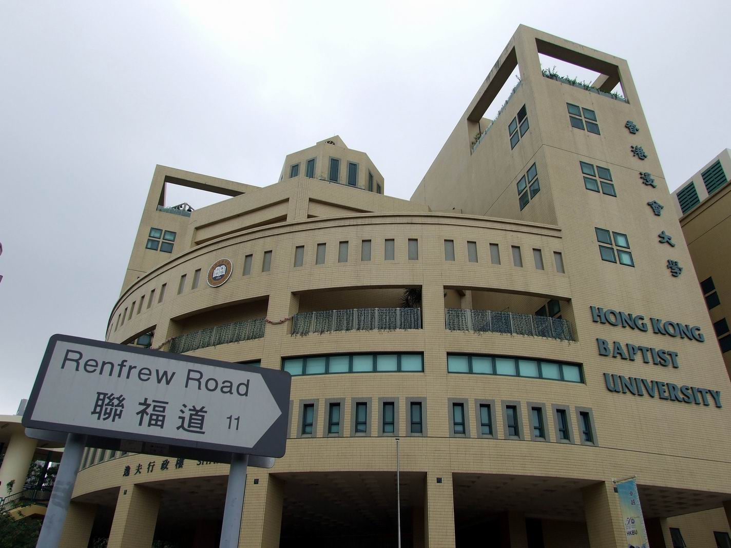 香港浸會大學位於聯福道的「逸夫校園」